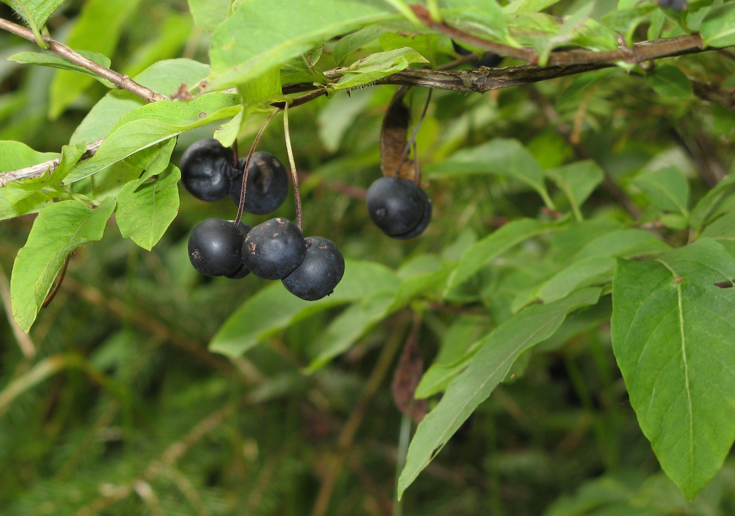 Schwarze Heckenkirsche